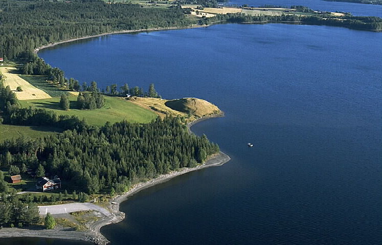 RAÄ-nummer Rödön 17:1. Tibrandshögen, resterna av den medeltida borgen Tibrandsholm. Motiv: Rödön 17:1 Nyckelord: Flygbilder, Riksintressen Kategori: Borg RAÄ-nummer Rödön 17:1. Tibrandshögen, resterna av den medeltida borgen Tibrandsholm. Rödön 17:1.